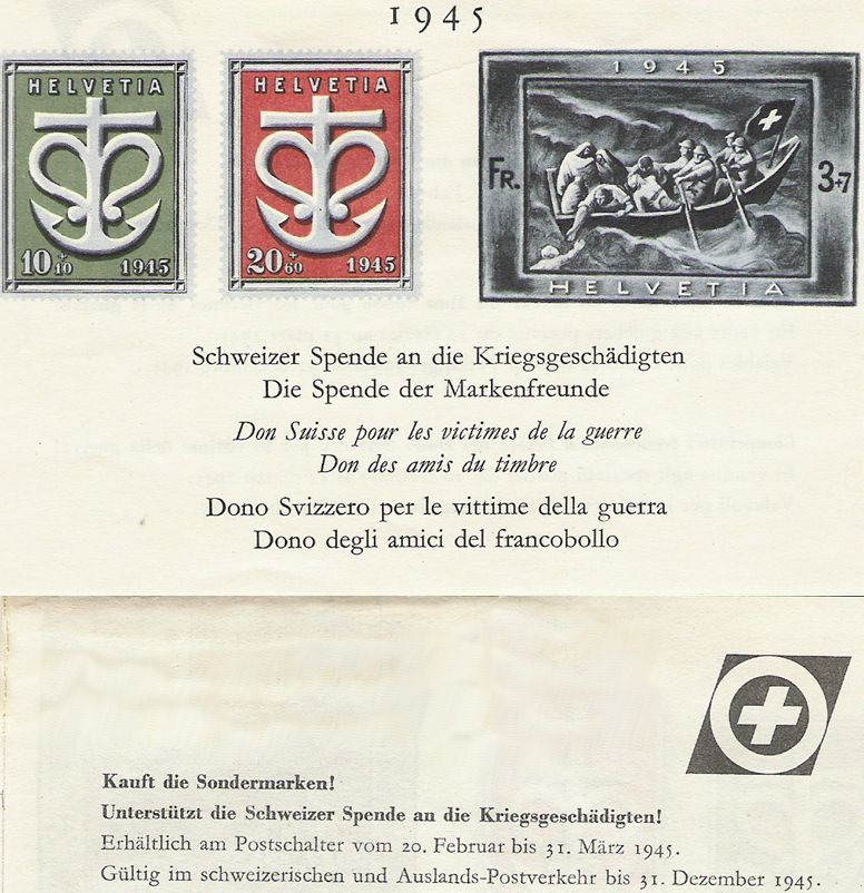 Swiss donation 1945, Switzerland